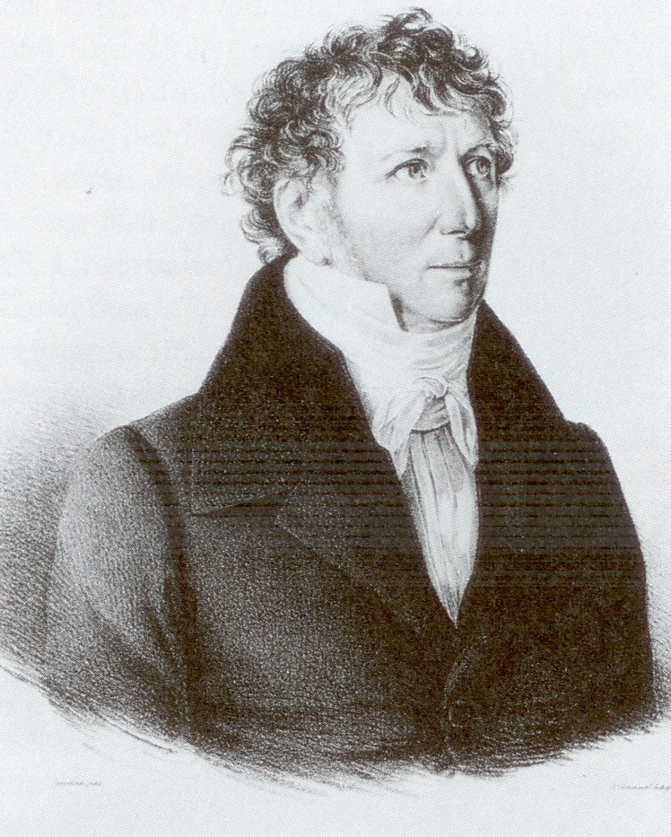 August Anton Wöhler (1771–1850), Frankfurter Agronom und Philanthrop.